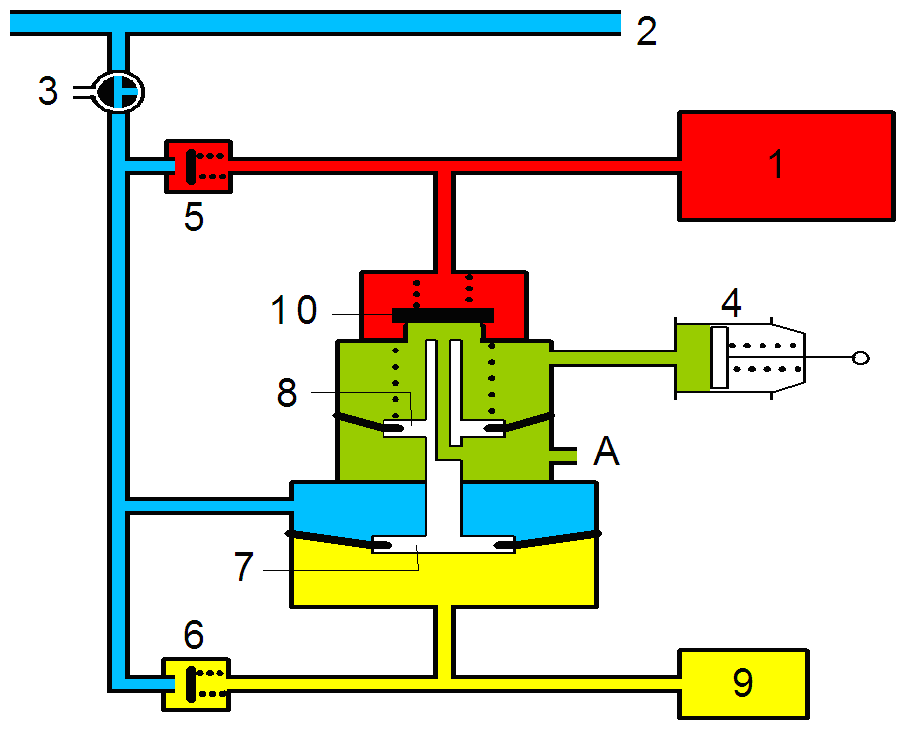 Steuerventil: Stufenweises Lösen 1 Hilfsluftbehälter 2 Hauptleitung 3 Ausschalthahn 4 Bremszylinder 5 Rückschlagventil 6 Rückschlagventil 7 Steuerkolben 8 Regulierkolben 9 Steuerbehälter 10 Einlassventil A Luftauslass ins Freie Wird durch das Führerbremsventil wieder Druckluft in die Hauptleitung eingelassen, so erhöht sich der Druck im Raum (blau) über dem Steuerkolben. Dadurch wird der Gleichgewichtszustand des Steuerkolbens gestört und dieser bewegt sich soweit nach unten, bis dessen Ventilstößel den Kontakt mit dem Einlassventil verliert. Die Druckluft (grün) kann nun aus dem Bremszylinder durch die Bohrung im Ventilstößel ins Freie entweichen, jedoch nur so lange, als die nach unten gerichtete Kraft genügt, um den Steuerkolben in der Lösestellung und damit die Bohrung des Ventilstößels offen zu halten. Mit der Abnahme des Bremszylinderdrucks wird auch der von oben auf den Regulierkolben 8 wirkende Druck schwächer, so dass sich der Steuerkolben unter dem Einfluss des Steuerdruckes (gelb) so weit nach oben bewegt, bis der Ventilstößel den Luftaustritt aus dem Bremszylinder schließt. Bei weiteren Druckerhöhungen in der Hauptleitung wiederholt sich der Lösevorgang.